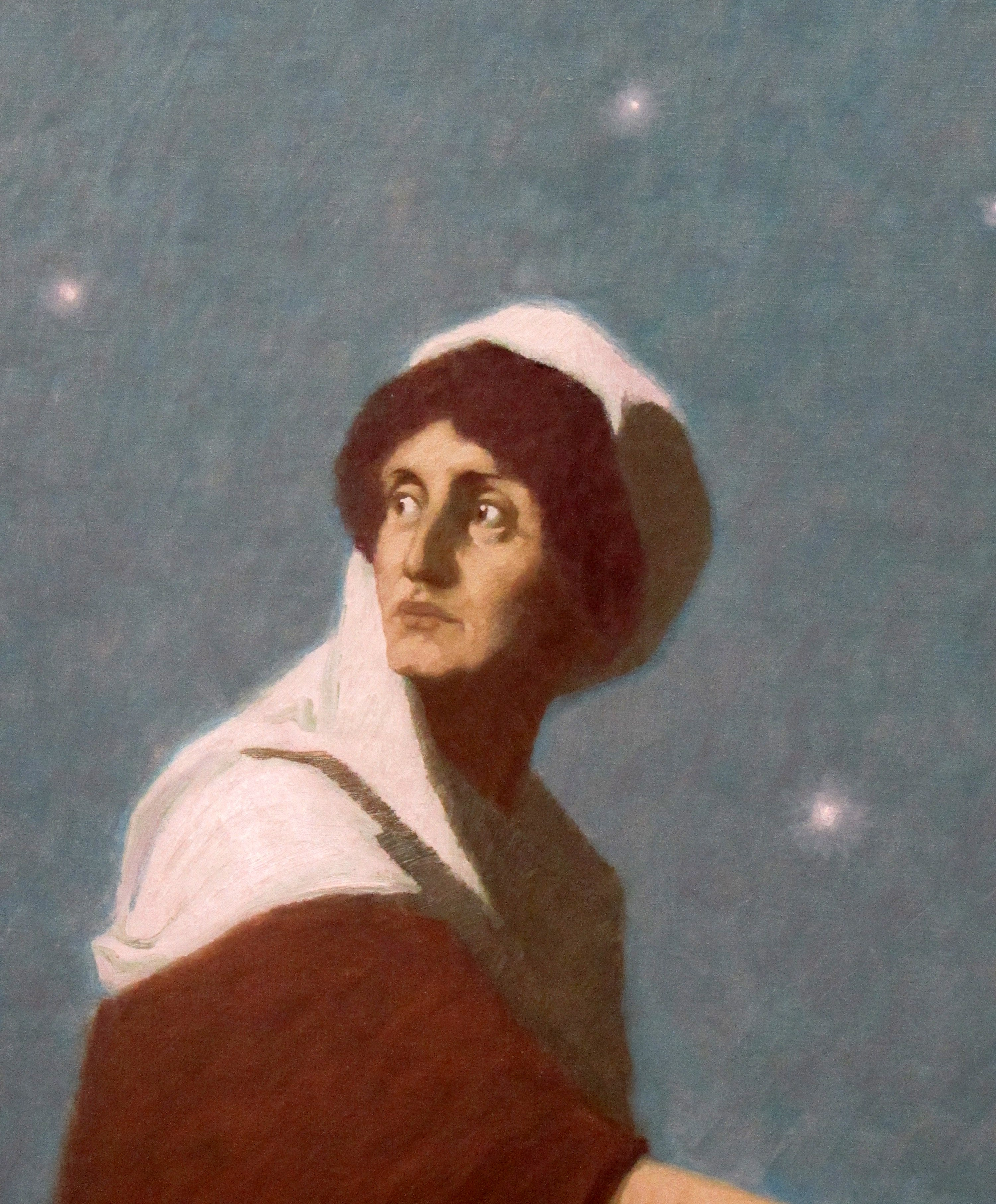 Wallfahrtskapelle St. Sebastian - Haisterkirch - Deckengemälde Heiliger Sebastian als Thema. Die Heilige Irene auf dem Fresko soll Gebhard Fugels Tochter sein.